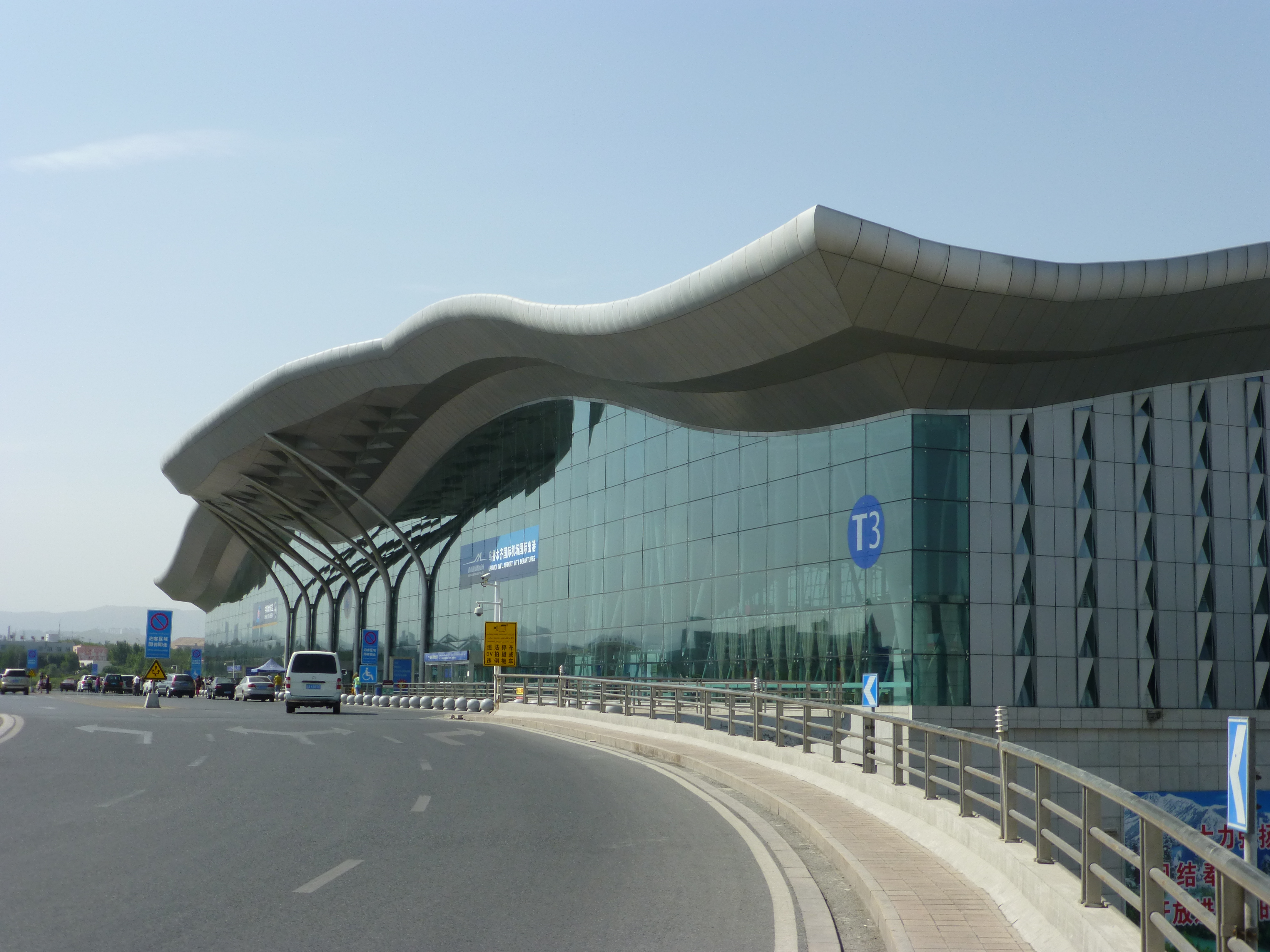 中文（中国大陆）: 中国新疆乌鲁木齐地窝堡机场3号航站楼